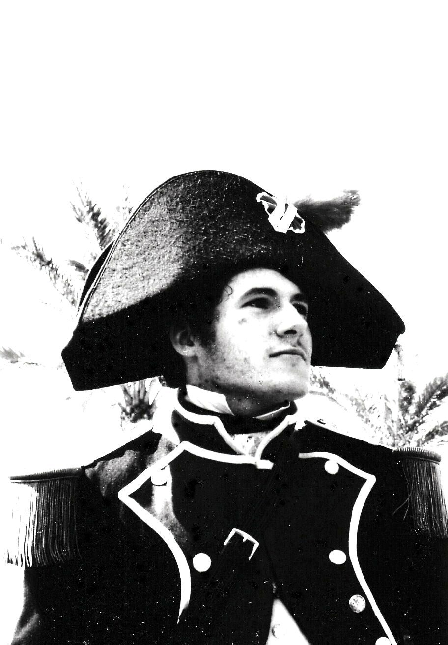 El investigador y recreador histórico Jon Valera como Capitán del Regimiento Suizo de Reding nº 3.